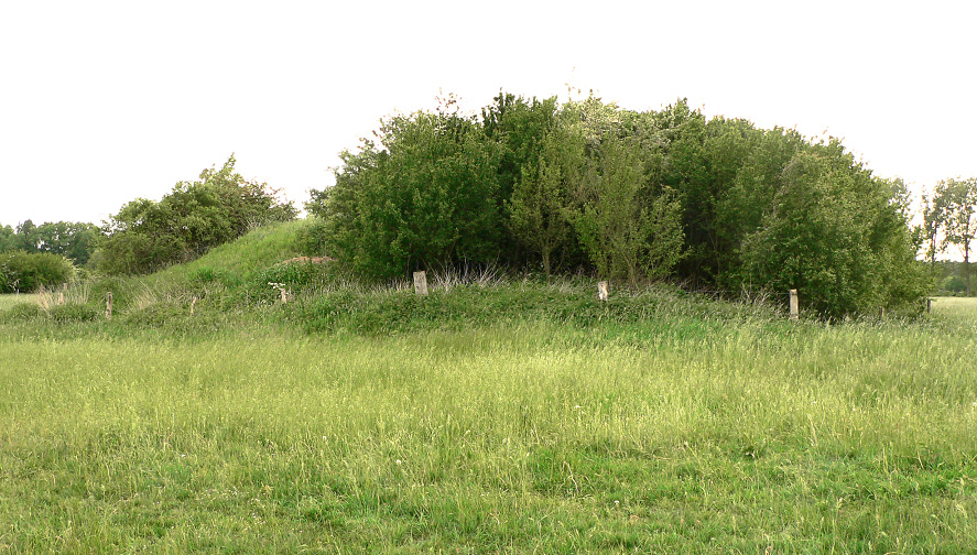 Burg Blankenhagen Haupthügel